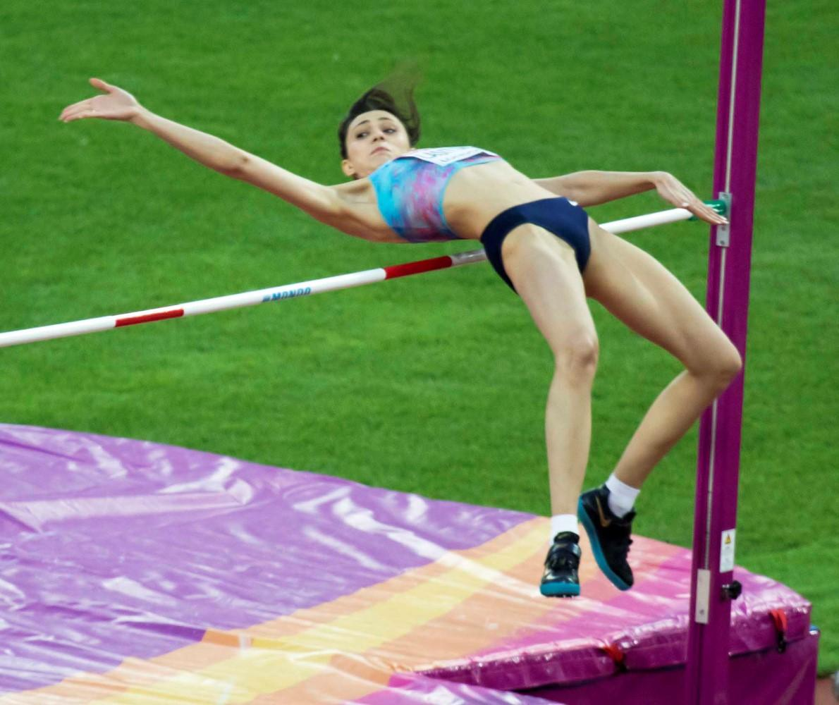 d8_23 hoog dames lasitskene